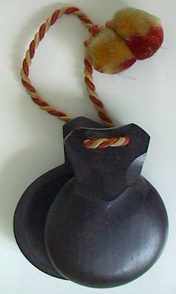 Castanets